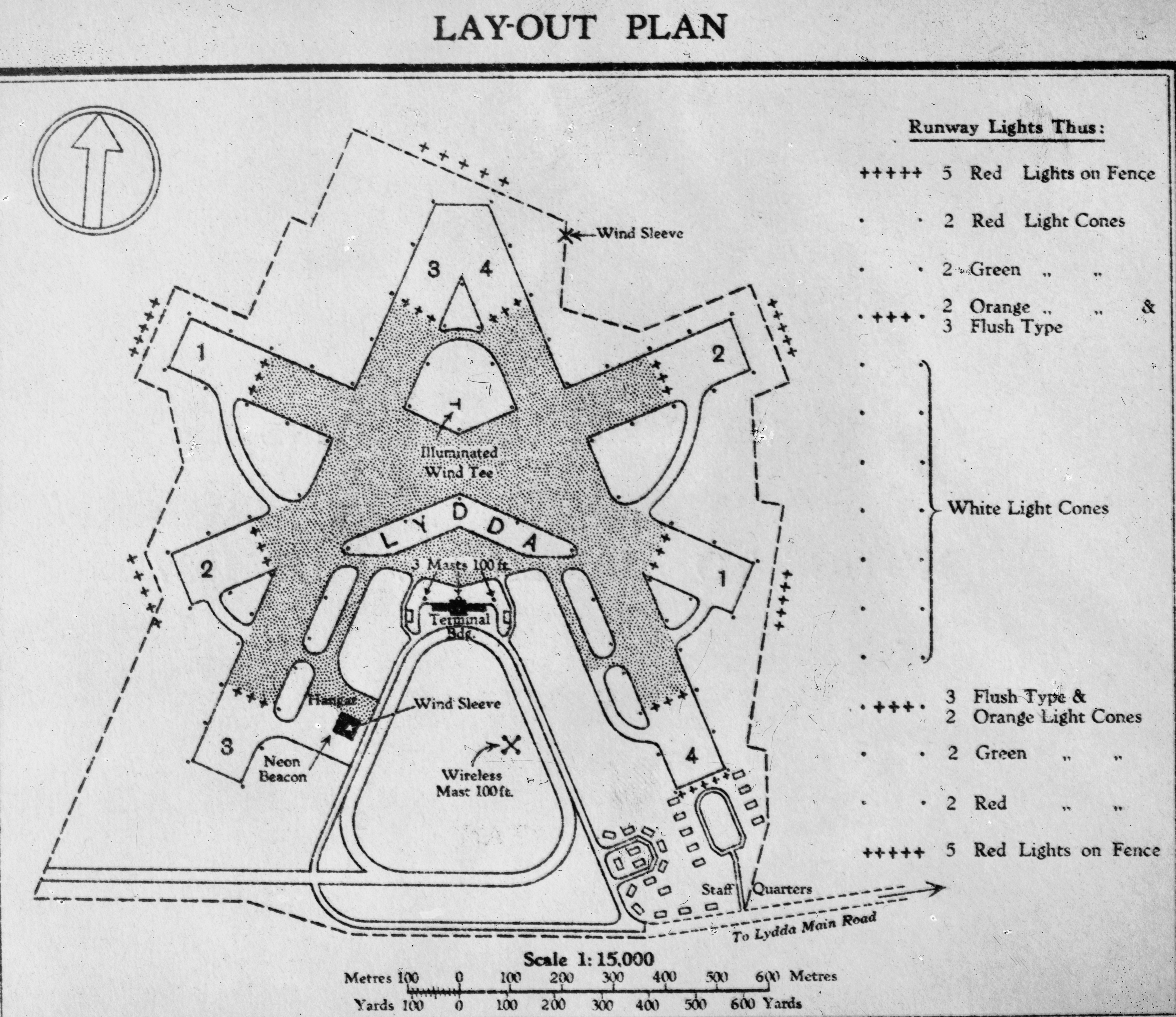 תוכנית שדה התעופה לוד בימי המנדט